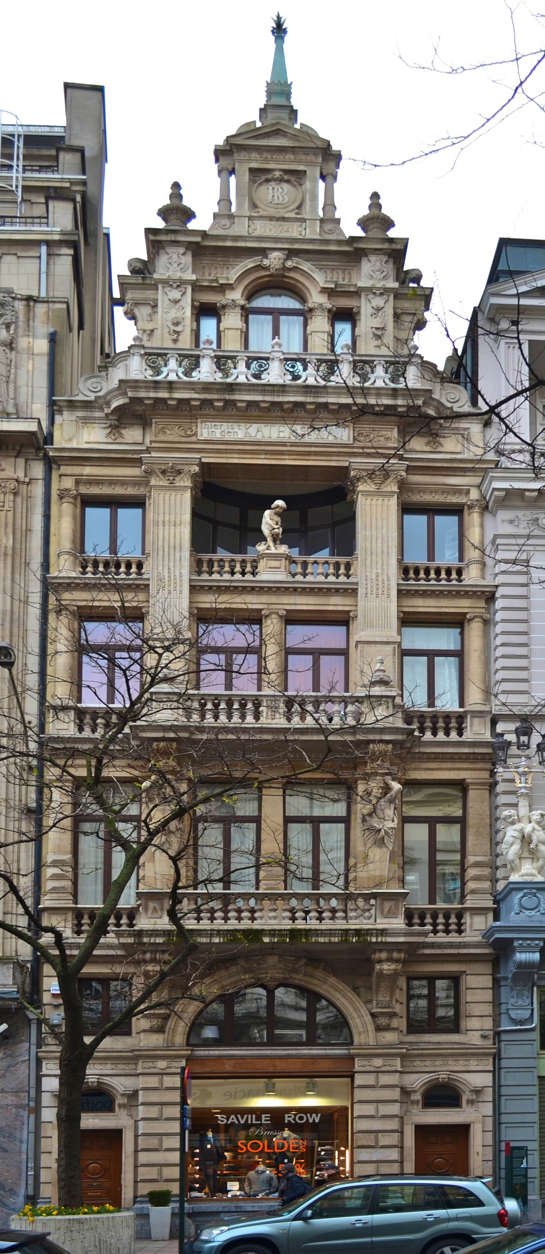 Bruxelles, la Maison des Chats , 1874-75, architecte Henri Beyaert